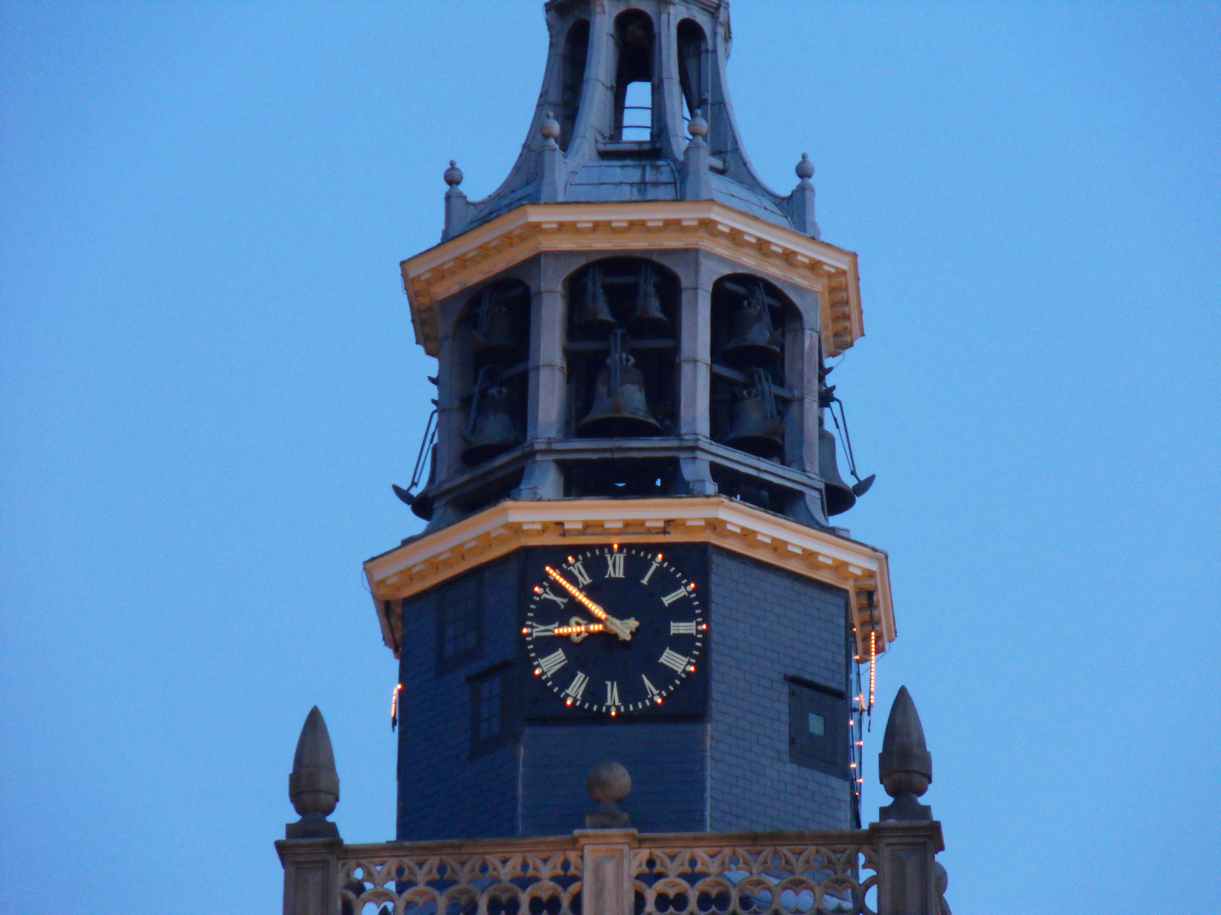 Turm der Sint Jans-Kerk in Gouda (NL)